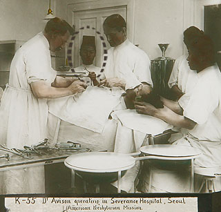 1904년 세브란스병원에서 병원장인 올리버 R 에비슨의 수술을 보조하는 박서양